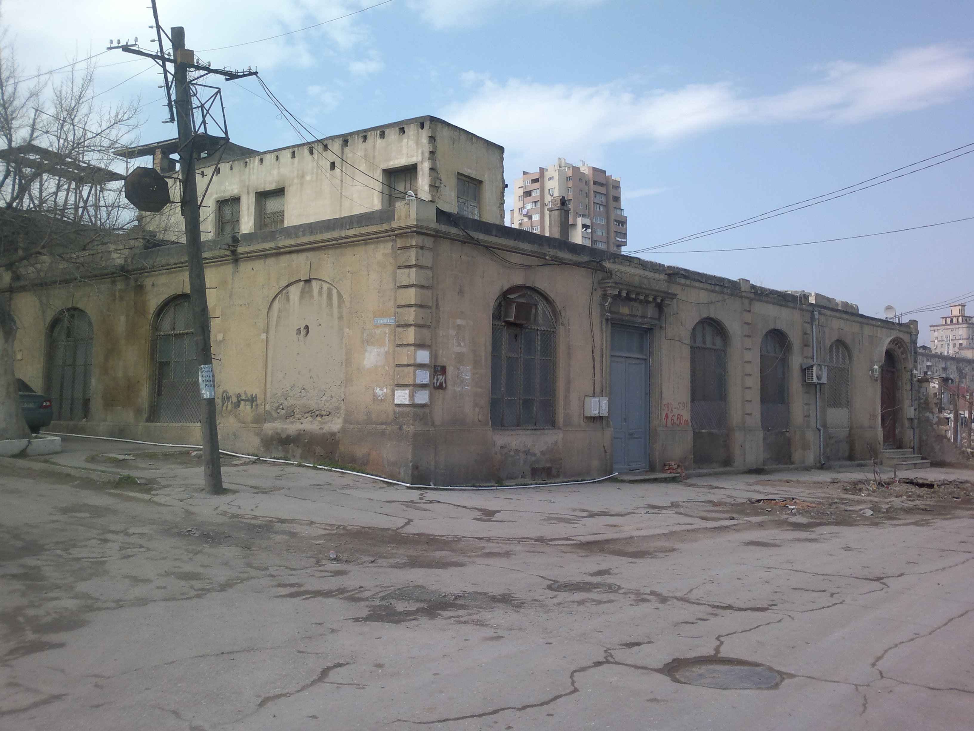 Building on Abdulla Shaig Street 171